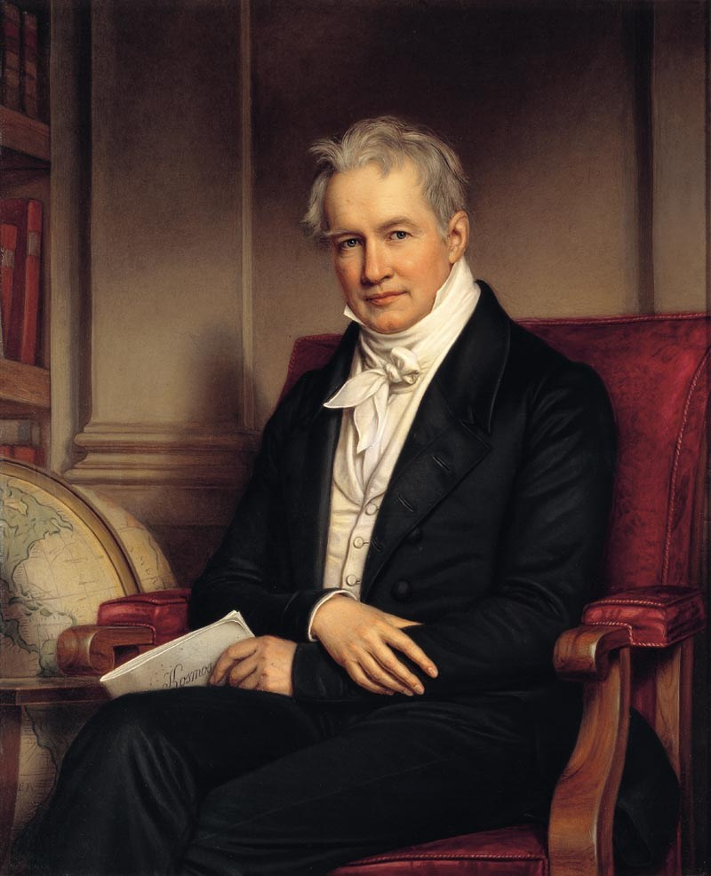 neben einem Globus sitzend mit einem Manuscript zu seinem Lebenswerk "Kosmos" 1845-1862